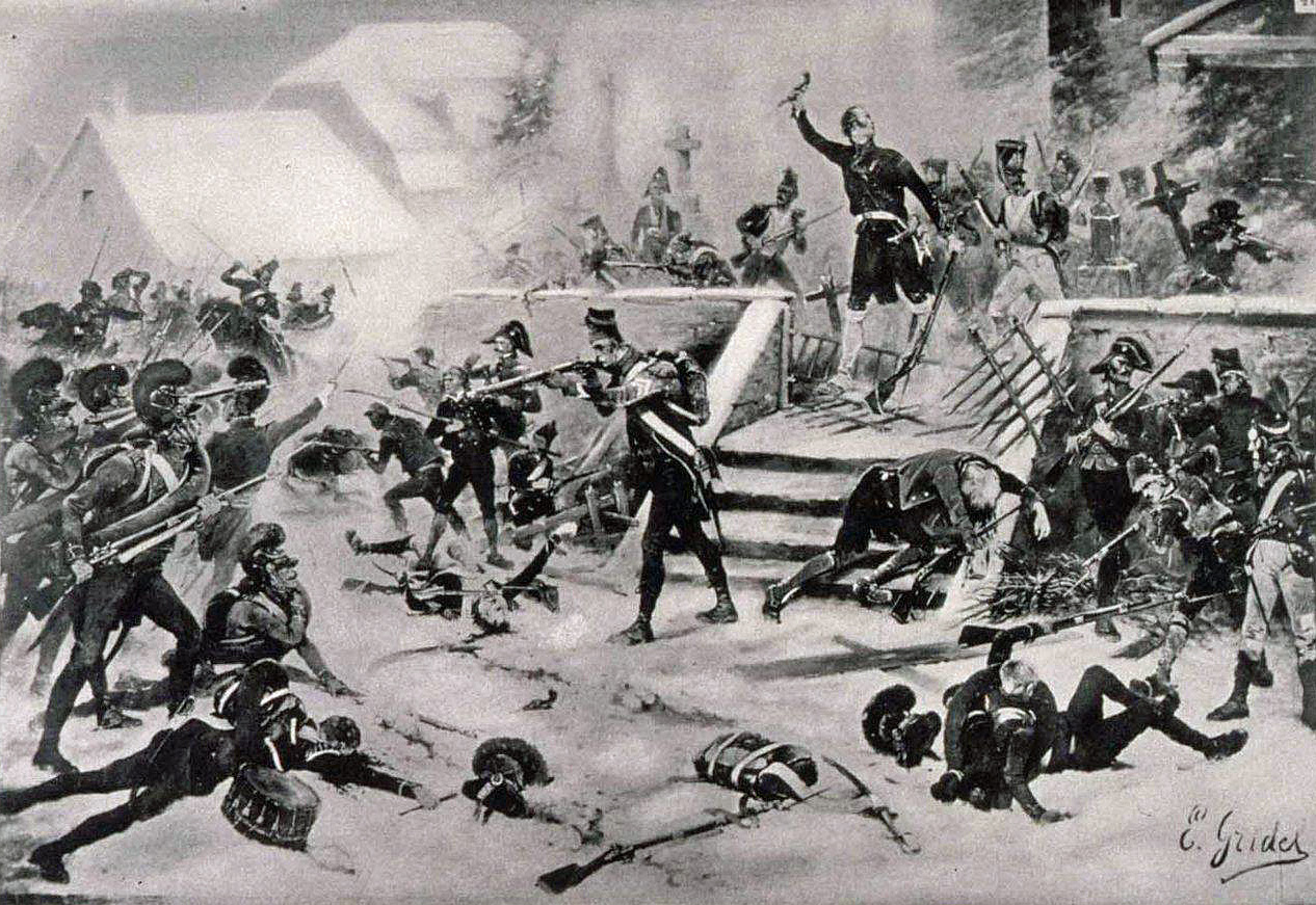 La défense du cimetière de Rothau par Nicolas Wolff et les partisans vosgiens, le 6 janvier 1814. Bibliothèque nationale et universitaire de Strasbourg